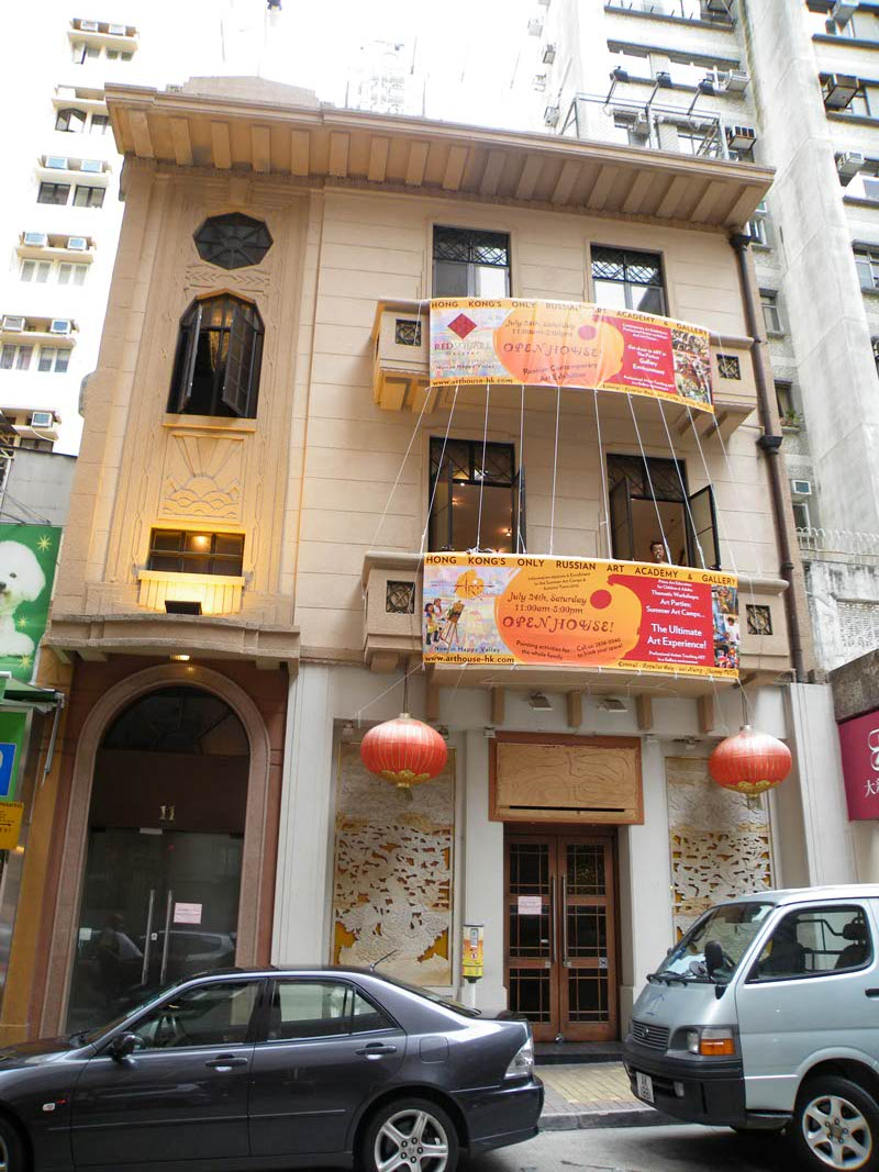 11 Yuk Sau Street